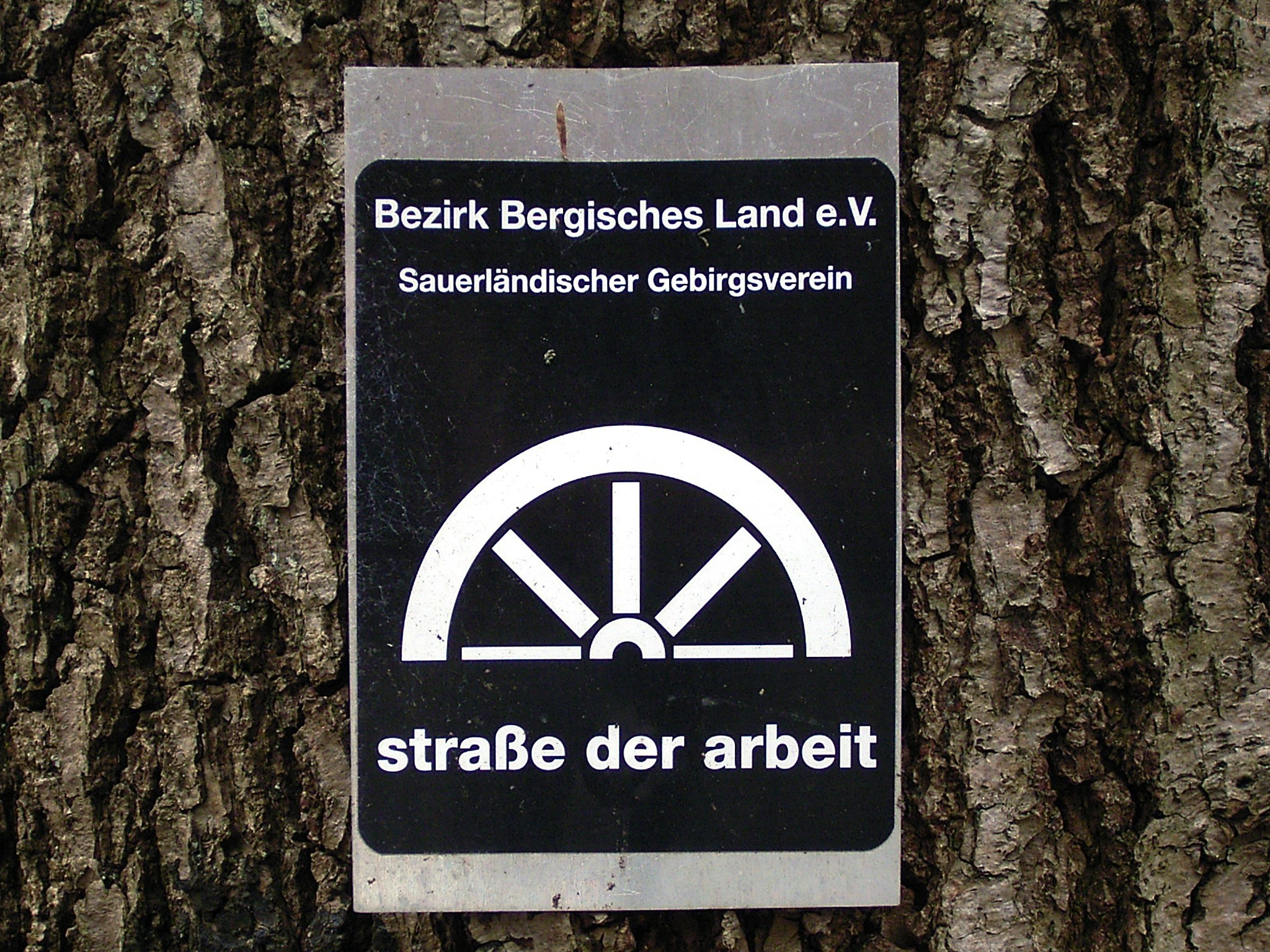 Schild „Straße der Arbeit“ des Sauerländischen Gebirgsvereins zu Beginn des Wanderweges in Wuppertal-Langerfeld